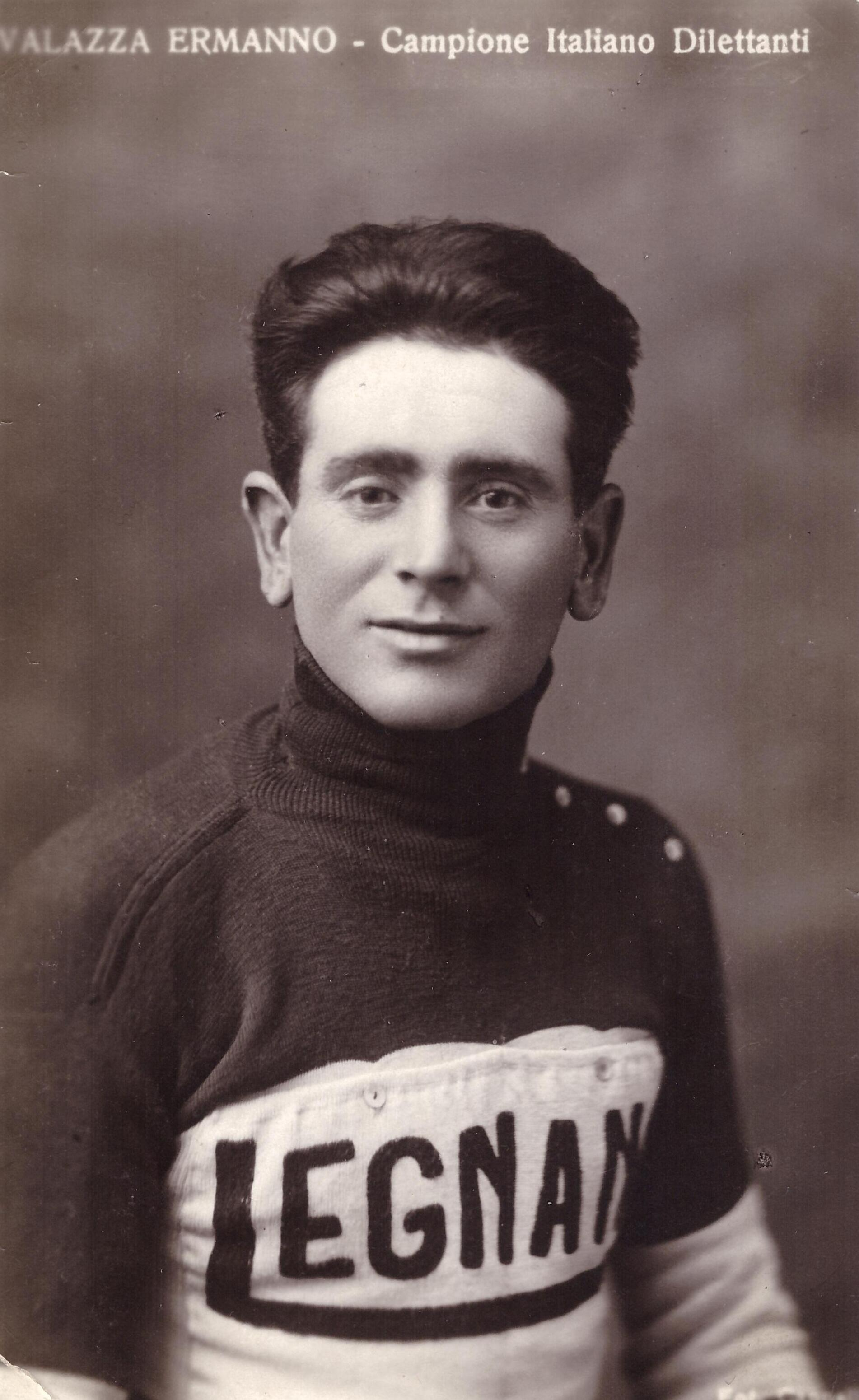 Picard: Ermanno Vallazza ( obin Valazza ) - coureu ciclisse italien - Cartolina postale - Foto Bayer - postée in 1927